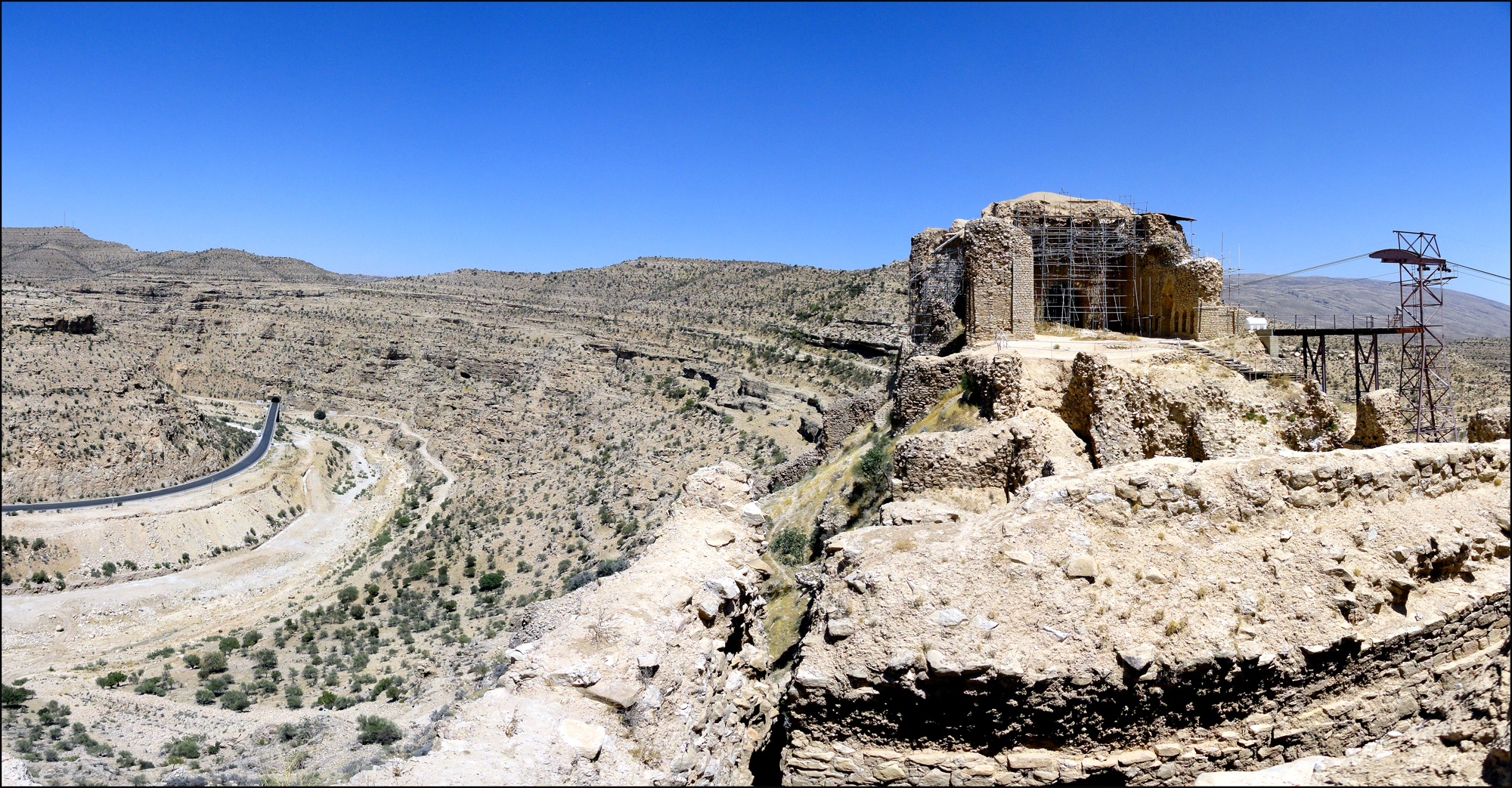 قلعه دختر فیروزآباد فارس